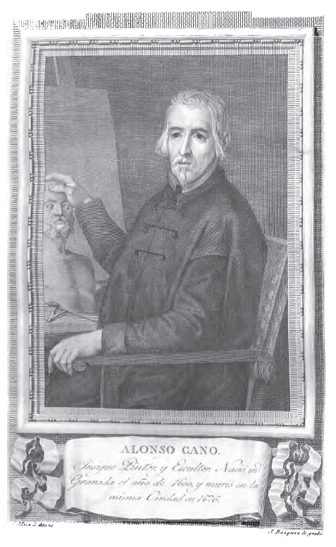 Retrato de Alonso Cano.